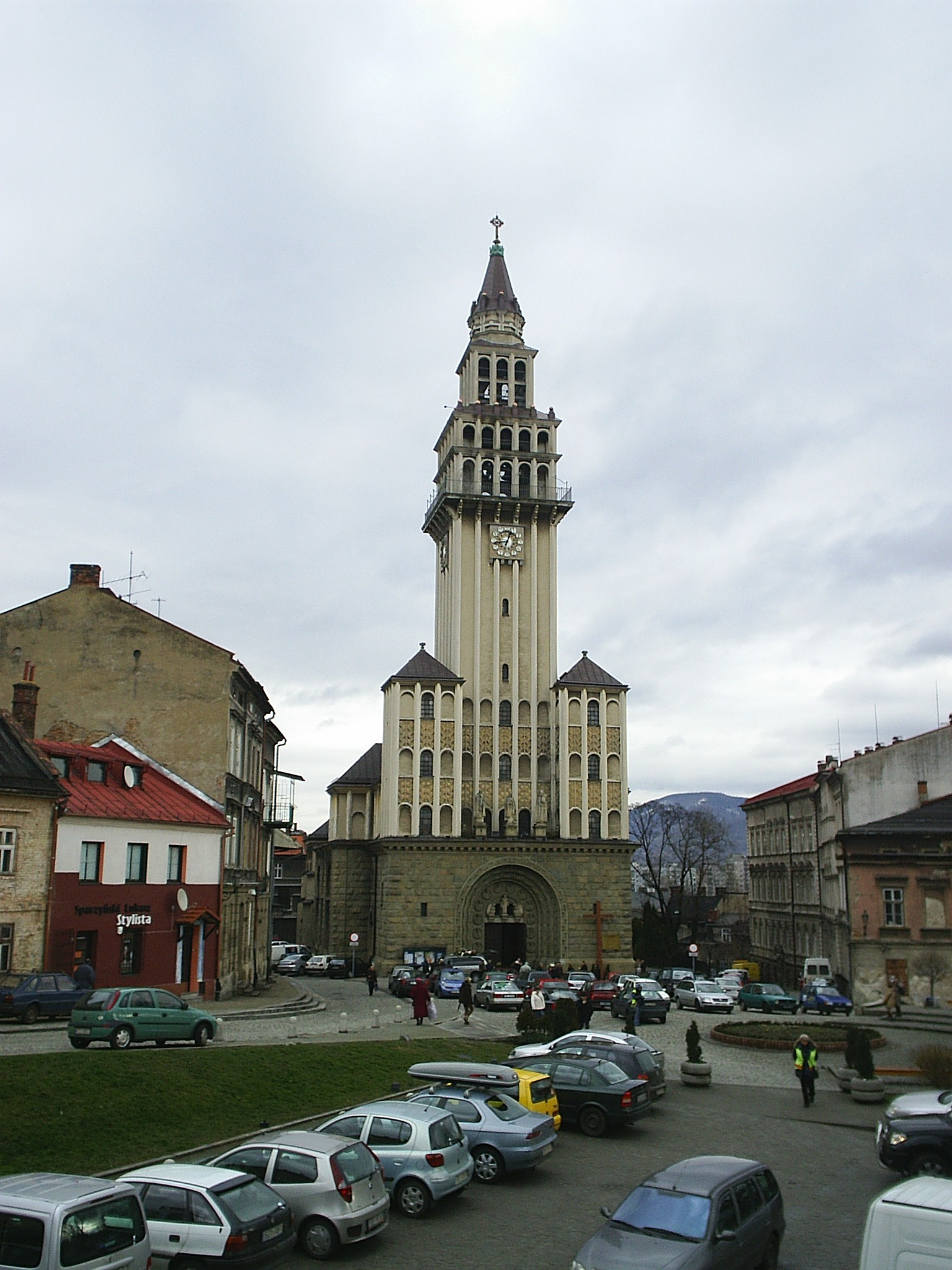 Katedra pw. św. Mikołaja w Bielsku-Białej